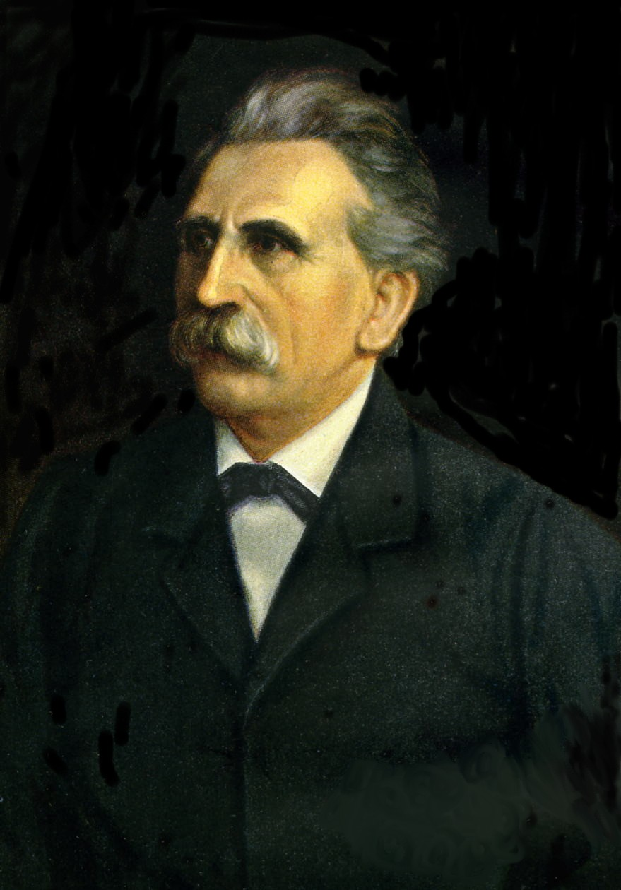 Friedrich Wilhelm Weber